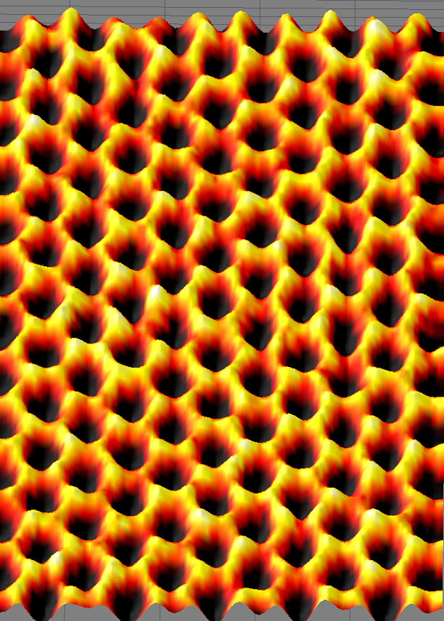 Graphene